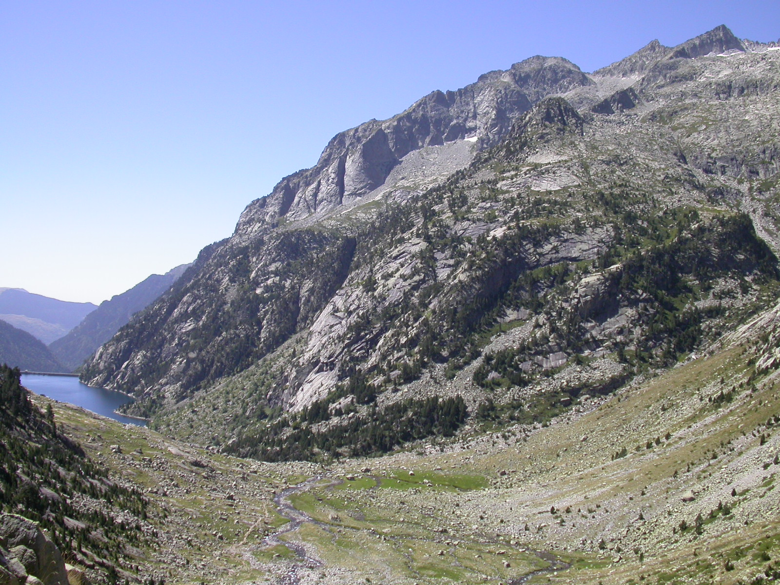 Vista de la presa de Cavallers